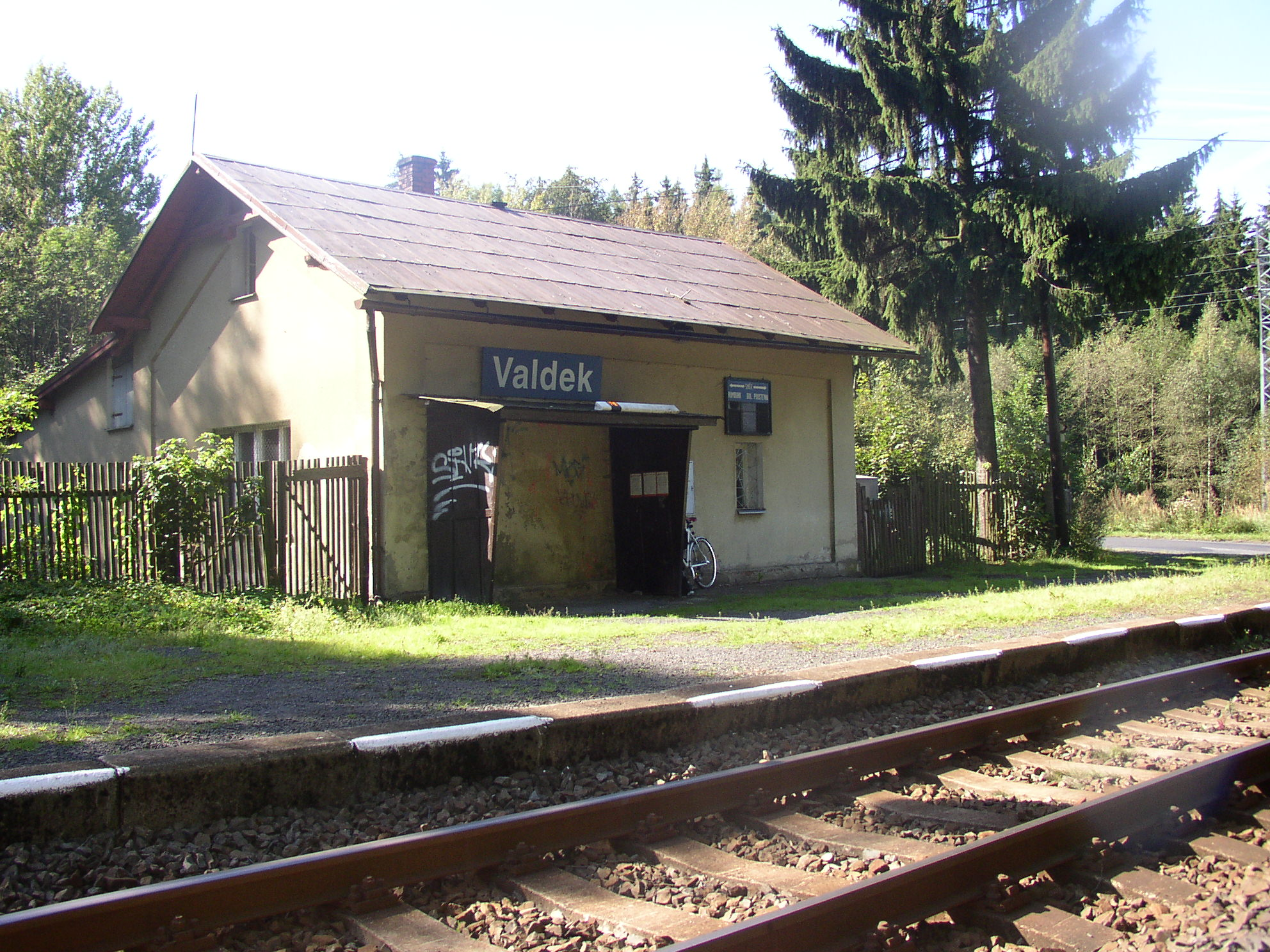 Železniční zastávka Vladek na trati Rumburk - Dolní Poustevna